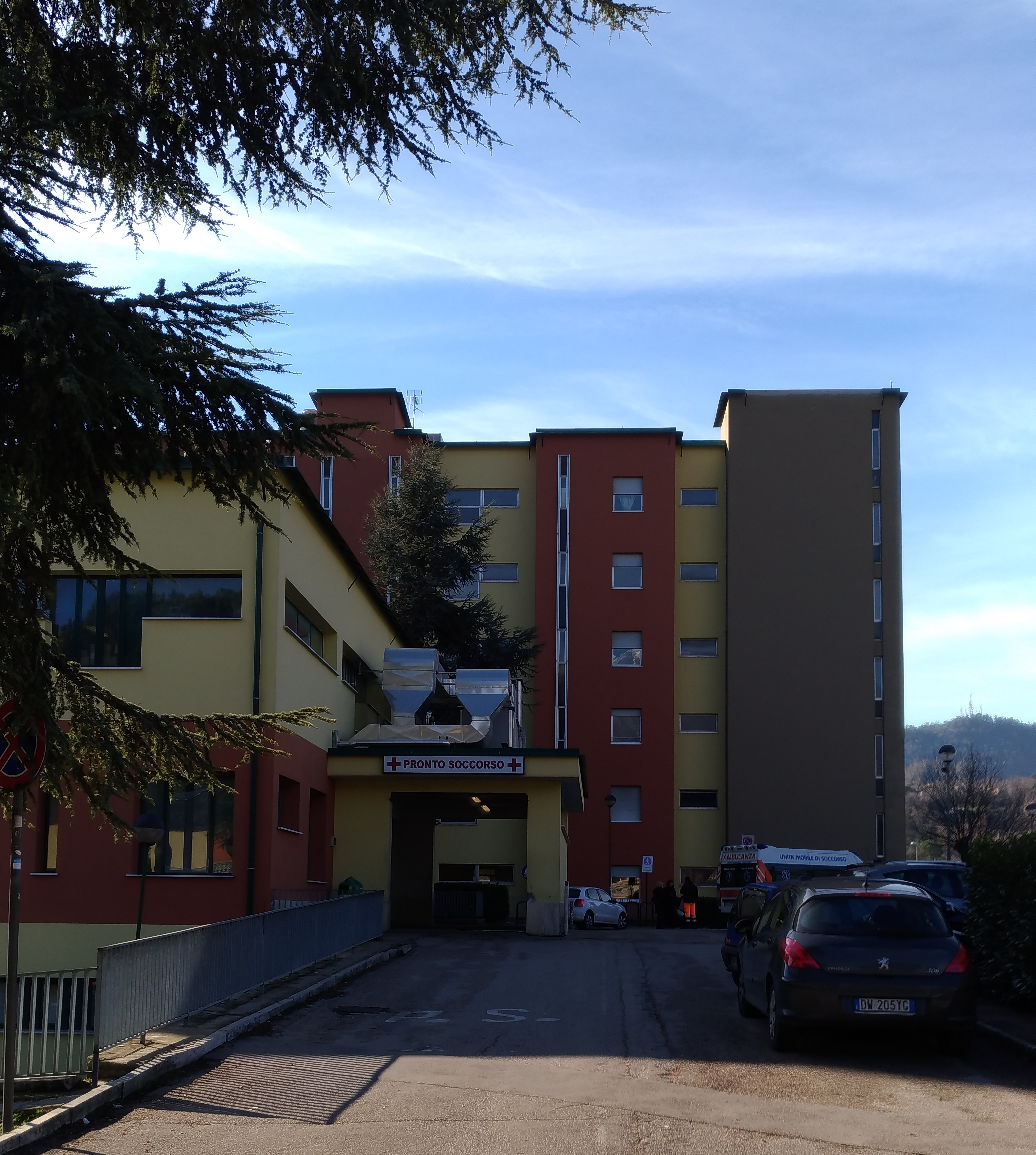 Ospedale San Benedetto di Alatri, pronto soccorso